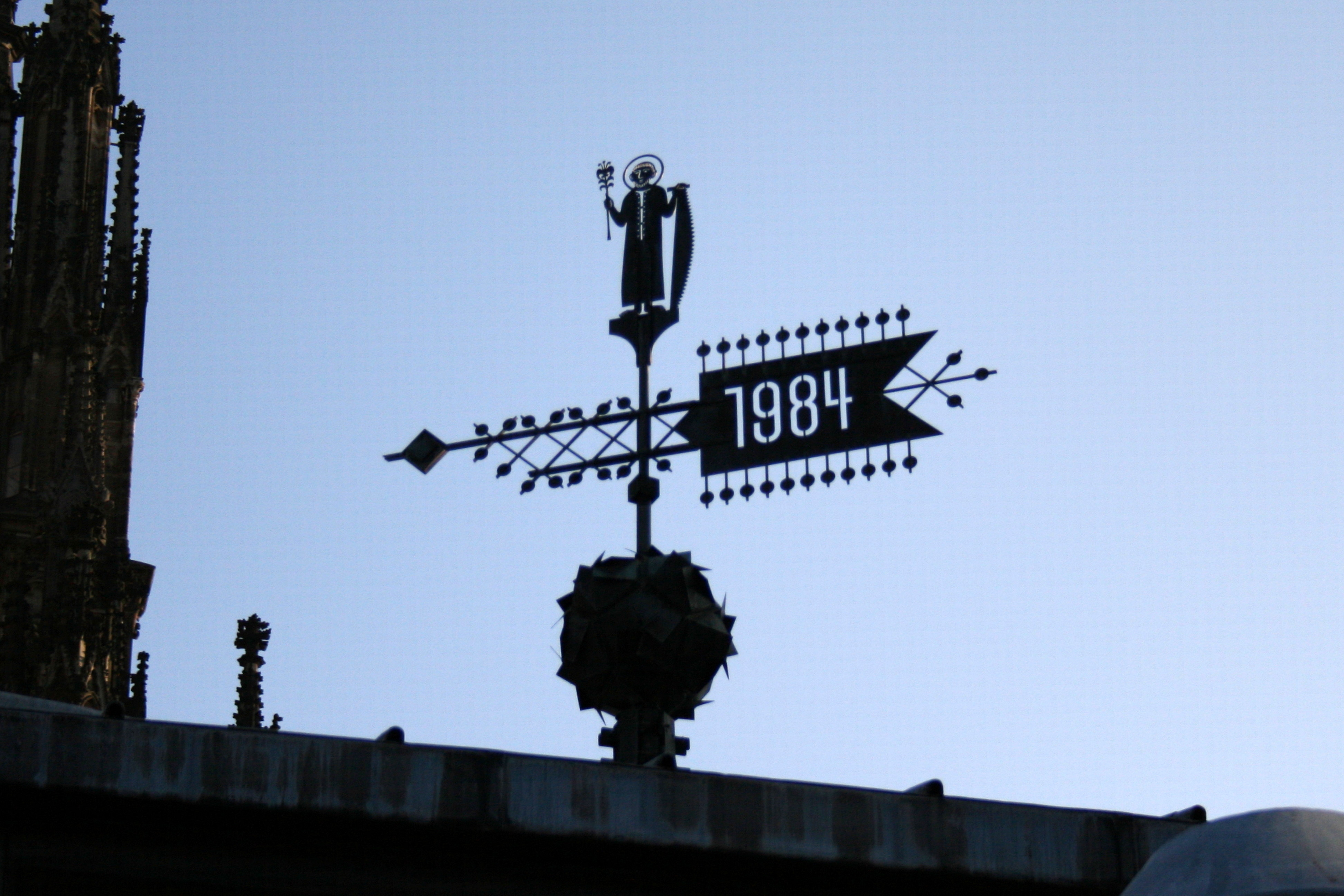 Dombauhütte in Köln